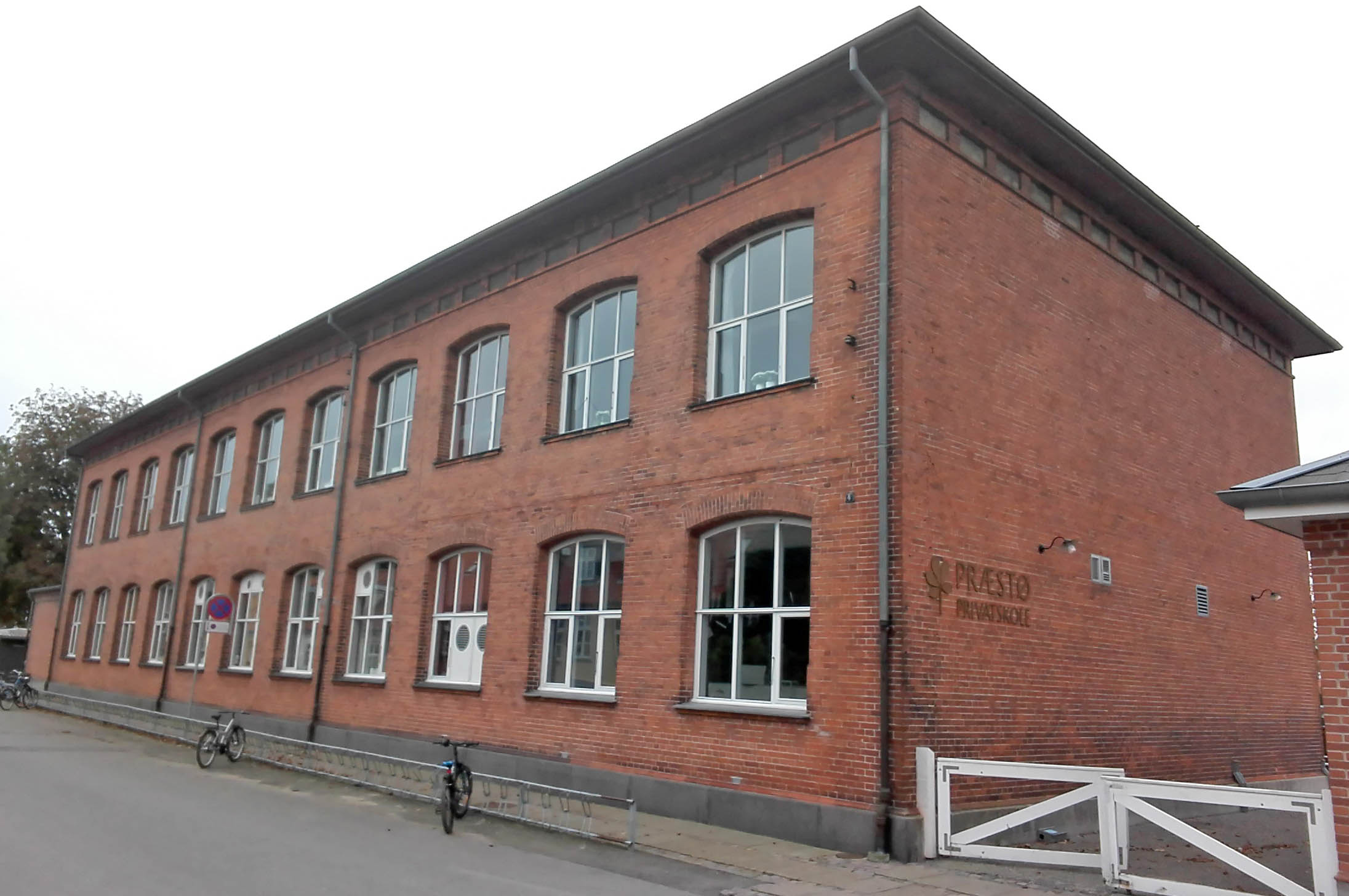 Præstø Privatskole